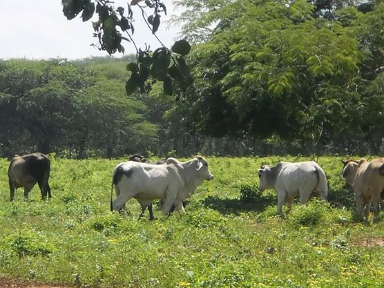 Economia